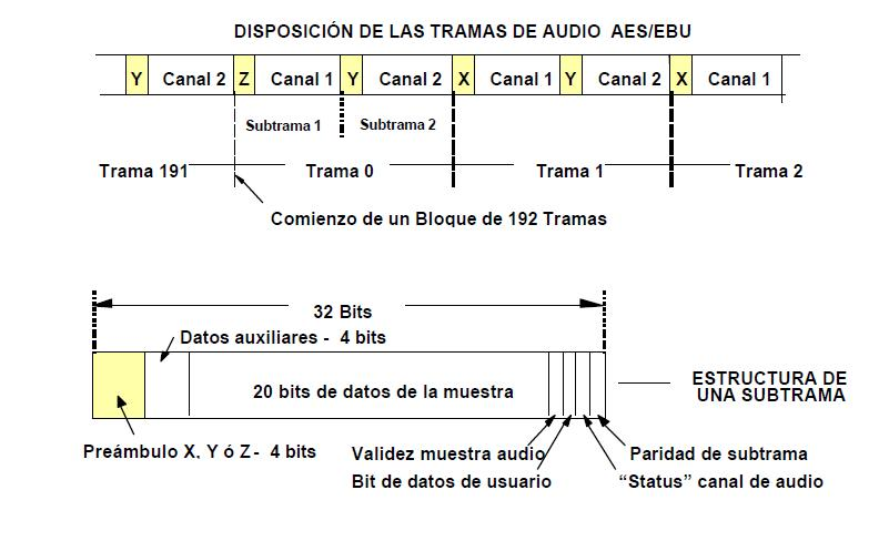 Tramas de audio